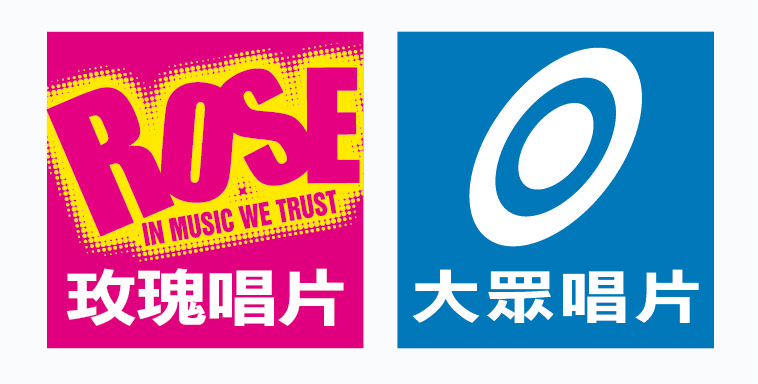 中文（台灣）: 玫瑰大眾唱片商標。